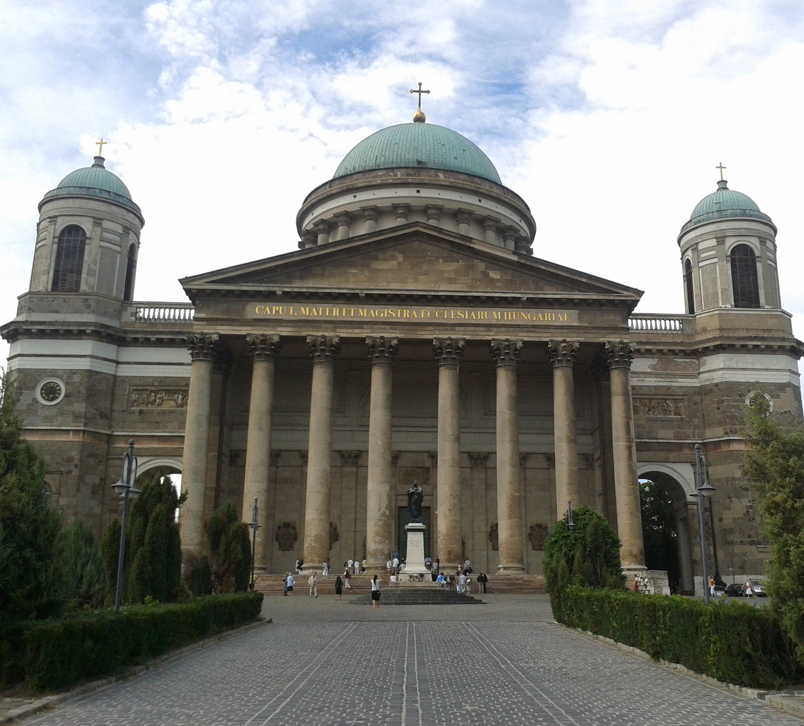 Főszékesegyház (Esztergom, Szent István tér) This is a photo of a monument in Hungary, Identifier: 6238